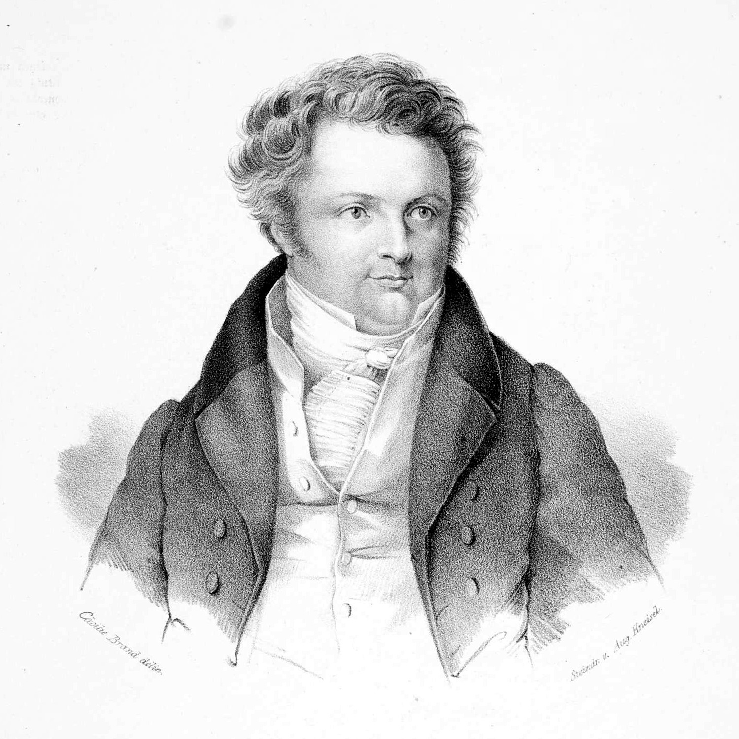 Depicted person: Heinrich Marschner